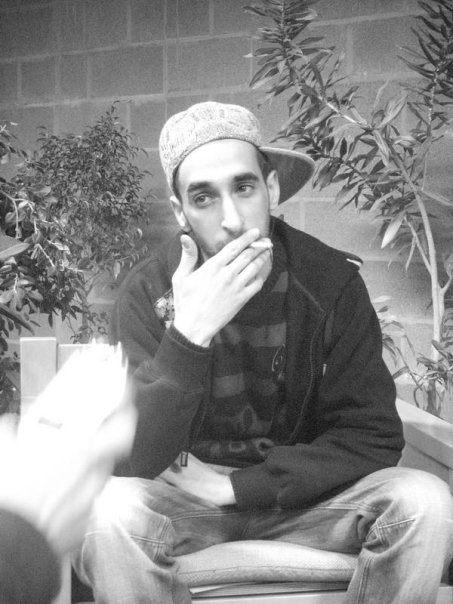 Aketo du groupe Sniper